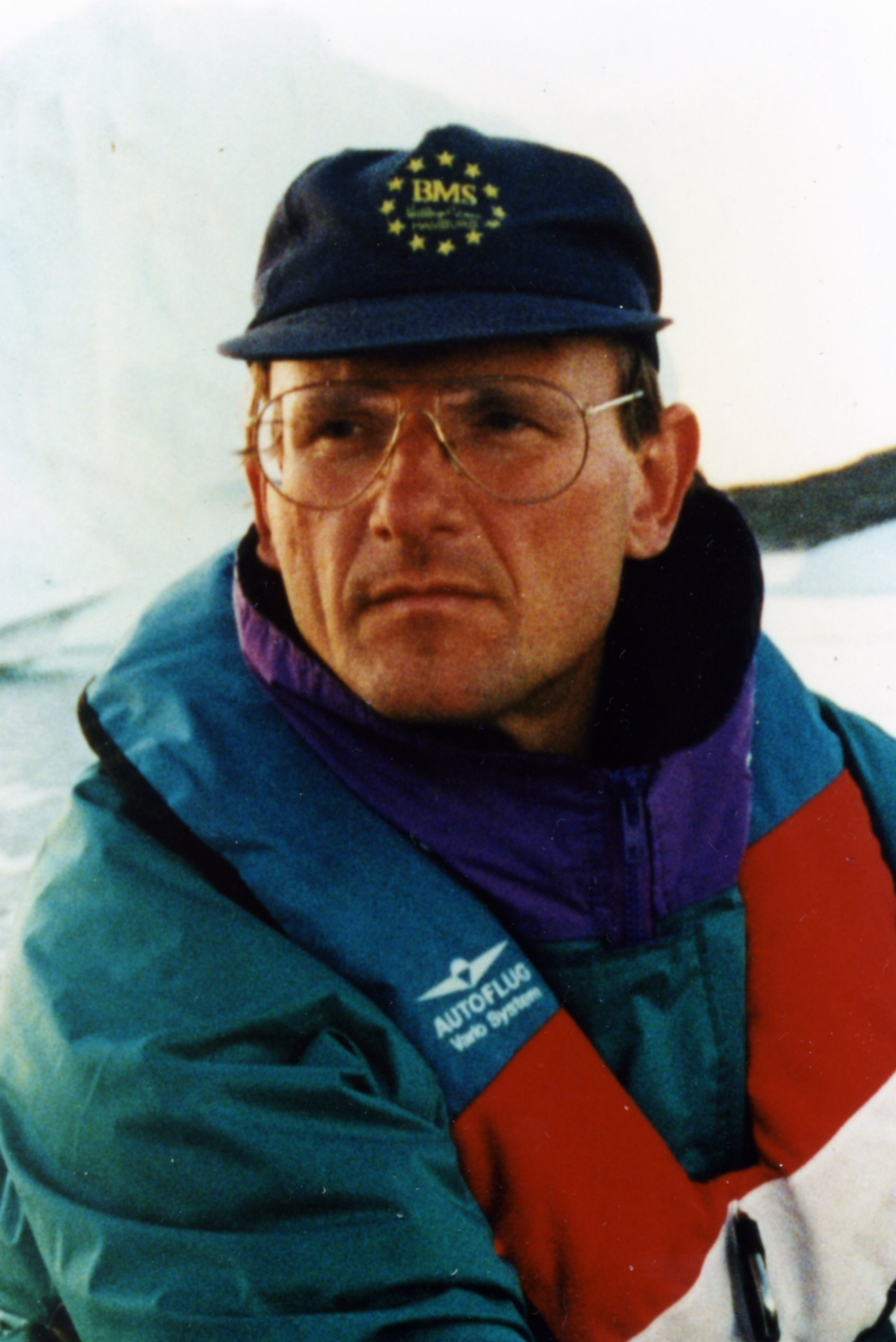 Der Kulturwissenschaftler Dr.Dr.Wolfgang Knabe auf der Mercator-Labrador-Expedition